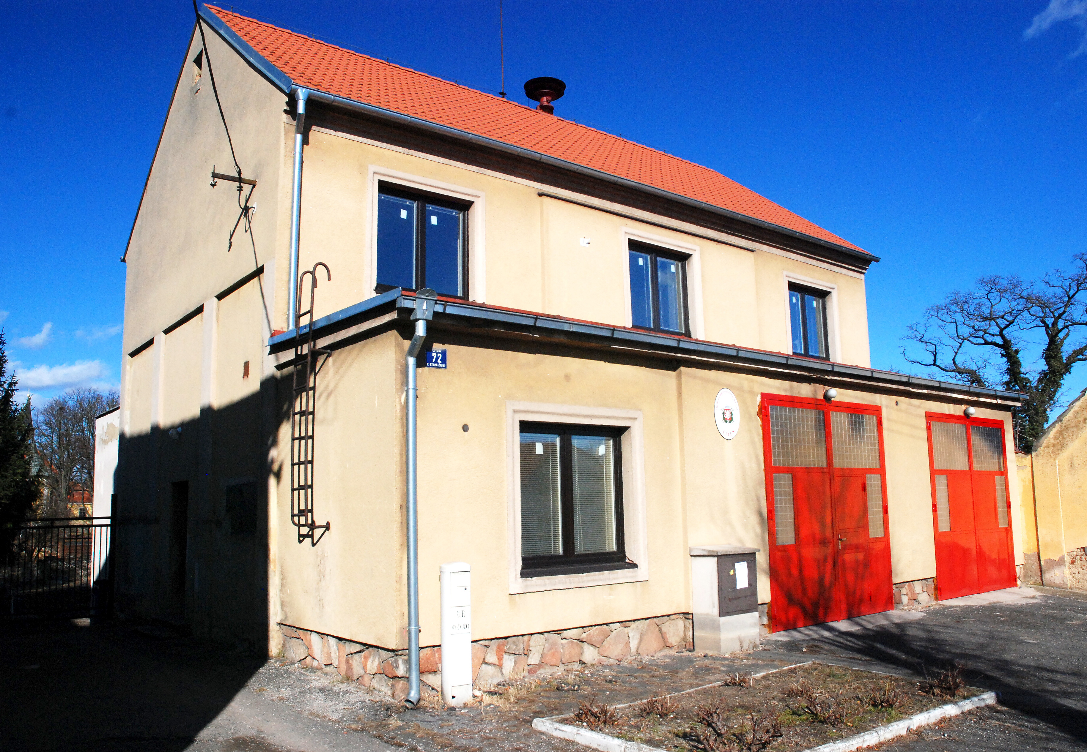 Bývalá synagoga v obci Liteň Project: Židovské památky.